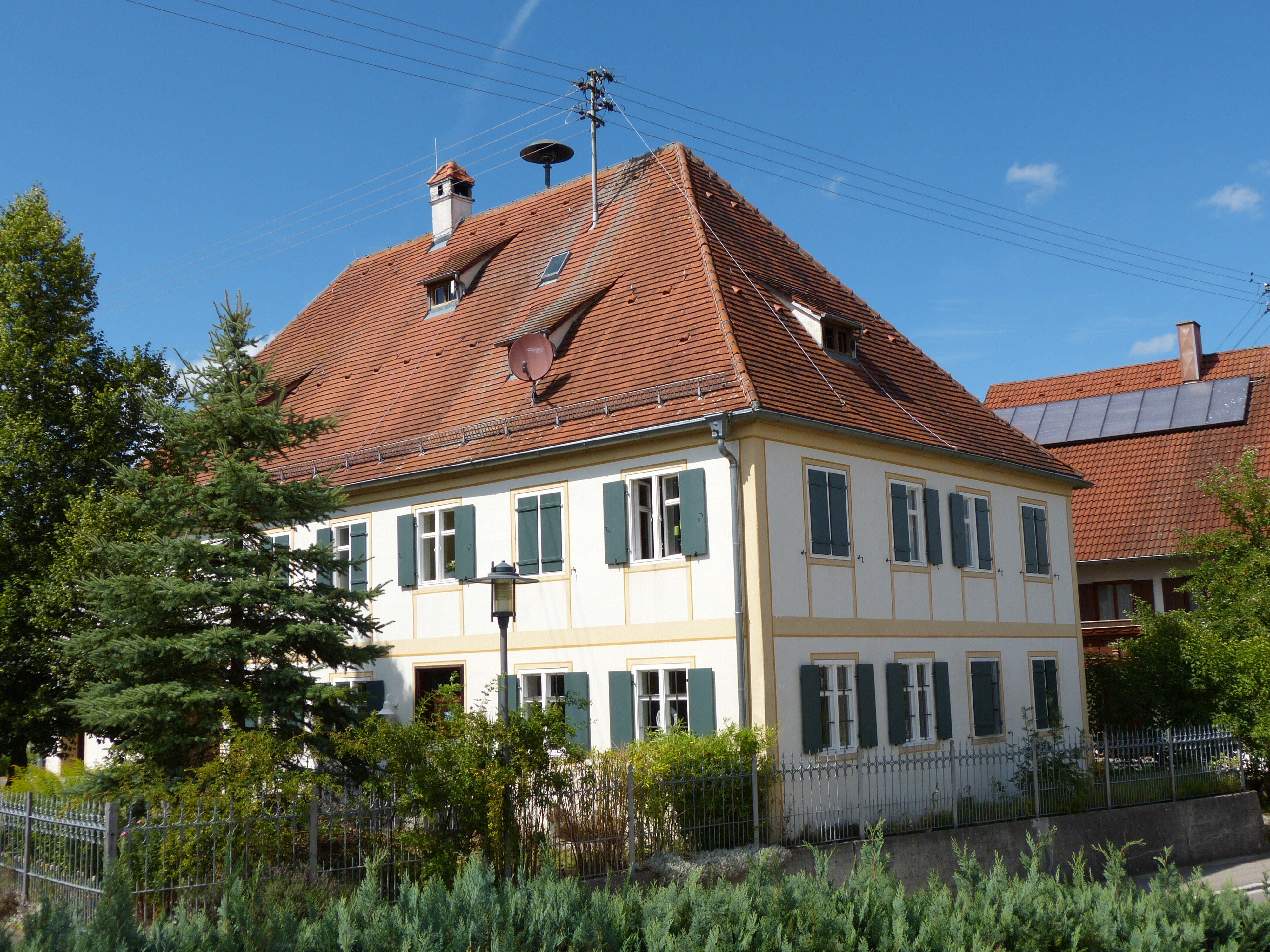 Westernach, Landkreis Unterallgäu, Bayern